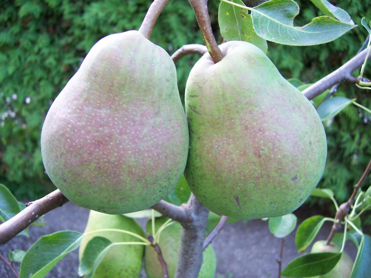 Birnbaum mit Frucht der Sorte "Lucas Alexander"